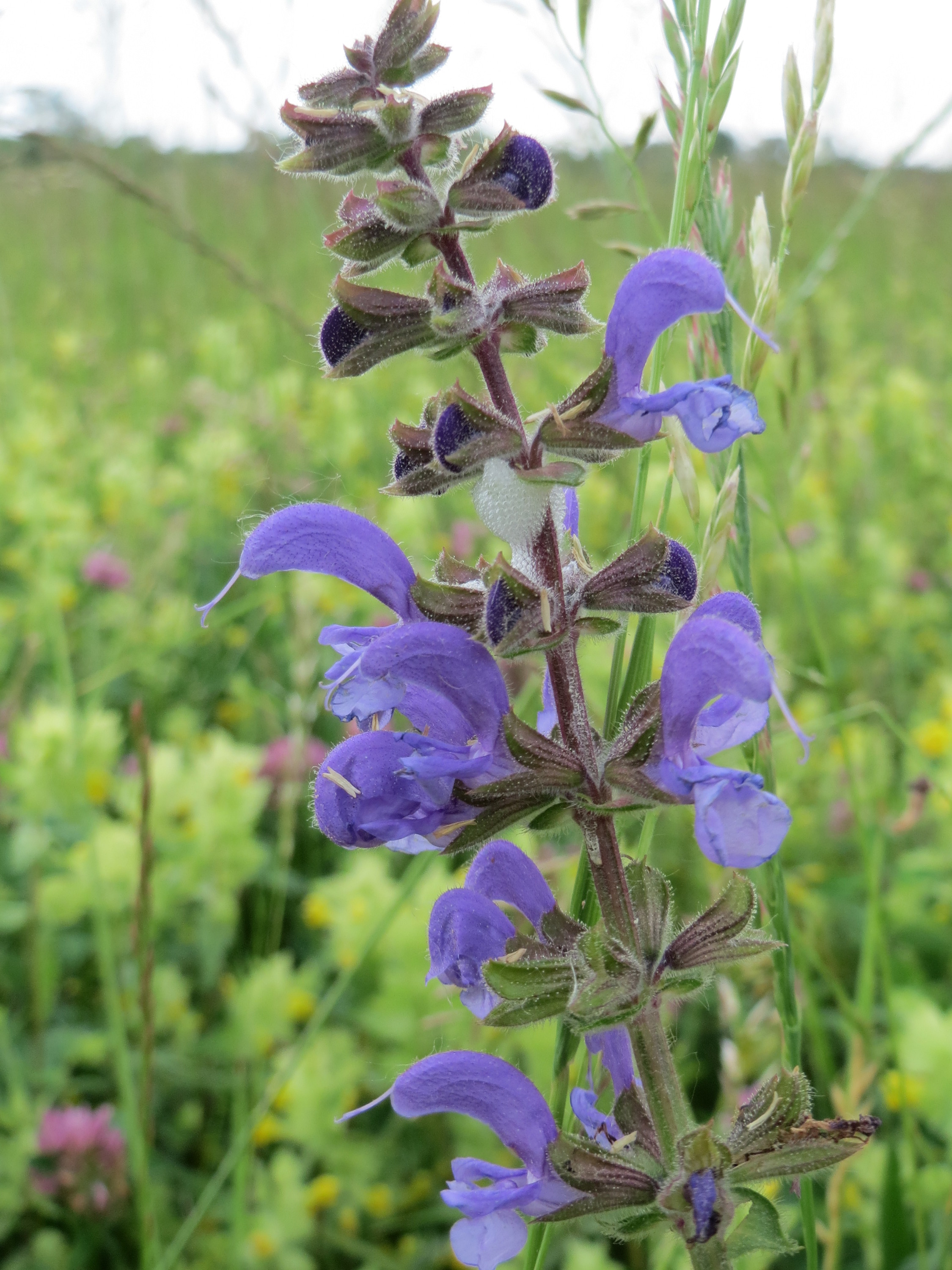 Wiesensalbei (Salvia pratensis) in den Horststückern im Landschaftsschutzgebiet Hockenheimer Rheinbogen